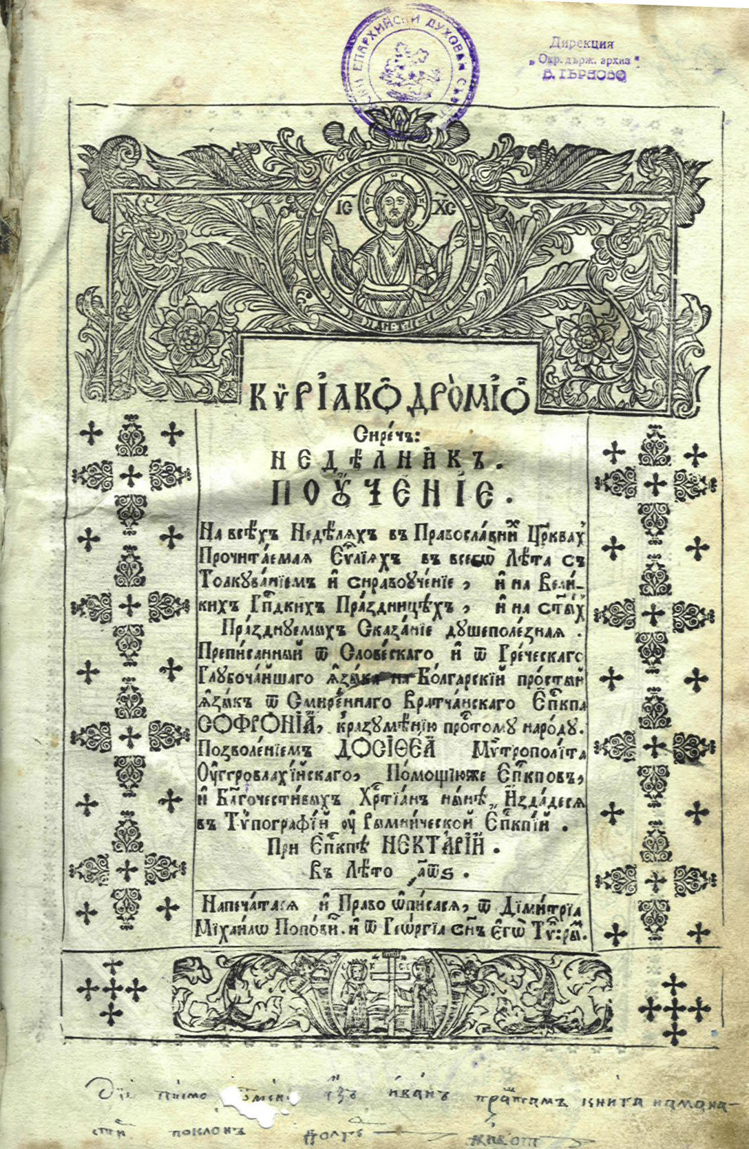 Заглавна страница на Неделника на Софроний Врачански